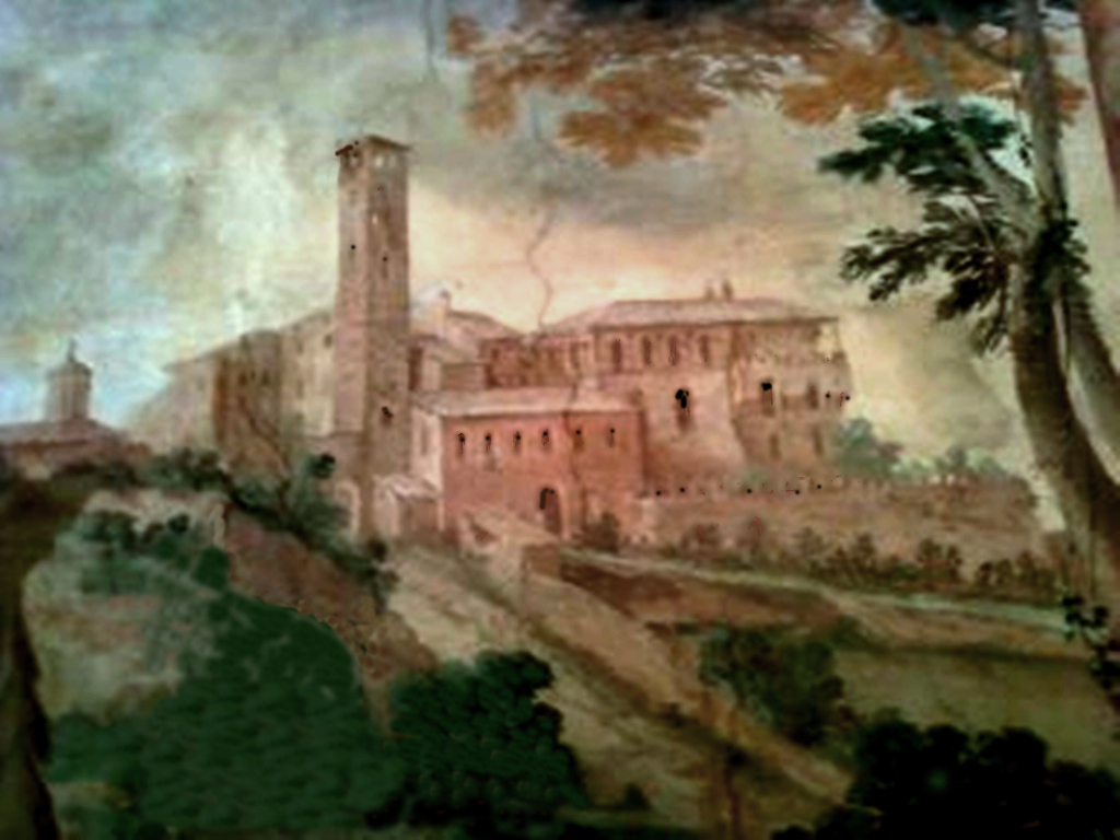 Affresco con l'immagine del castello medievale di Castelnuovo dei Terzi, integralmente riedificato nel Settecento come palazzo nobiliare , su disegno attribuito all'architetto Luigi Vanvitelli. É conservato all'interno del medesimo palazzo, oggi sede della Fondazione Toniolo dell'Università Cattolica del S. Cuore.